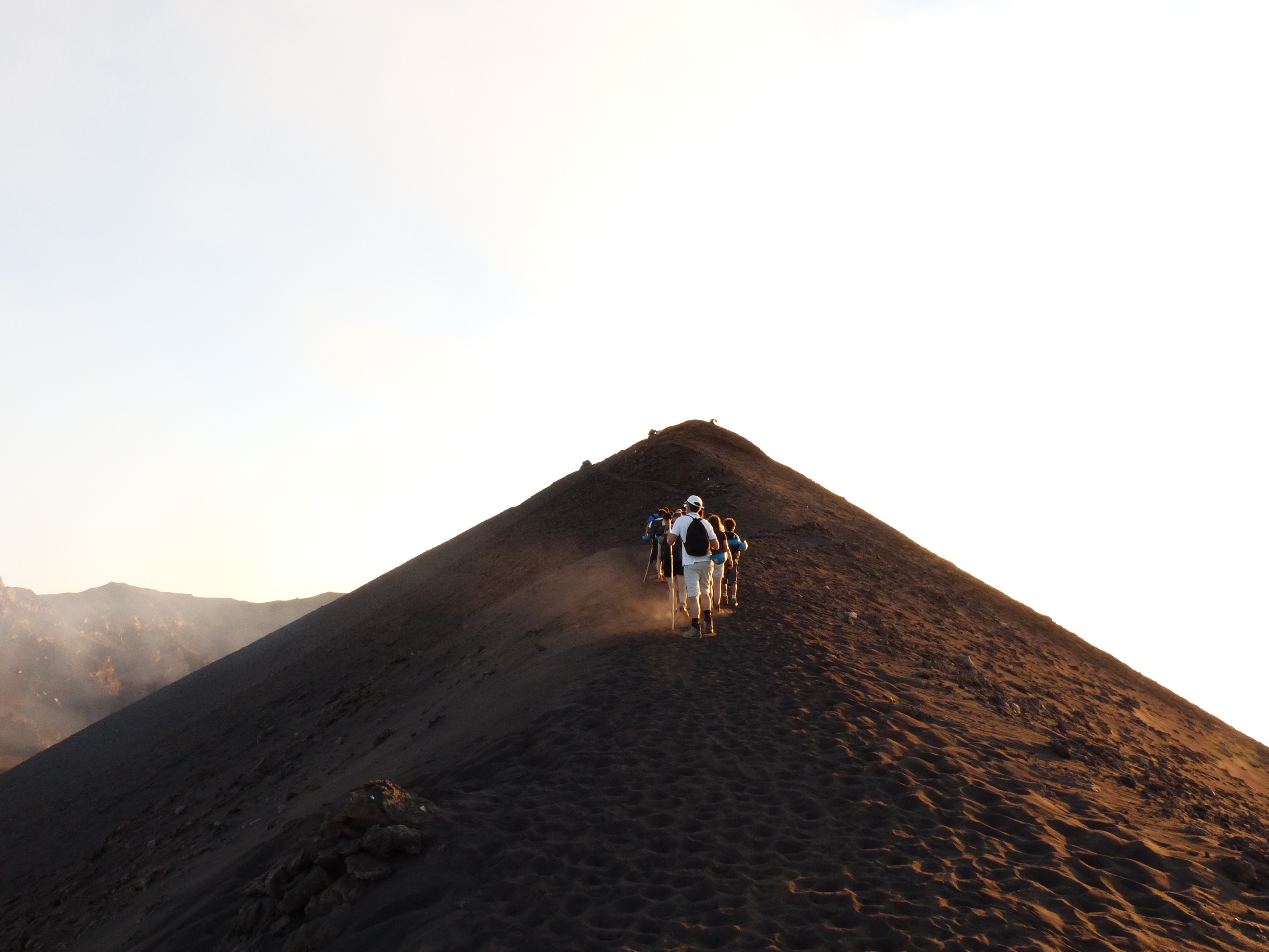 De camino a la cima, Stromboli, Islas Eolias.